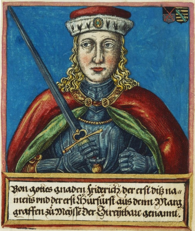 Friedrich IV., der Streitbare (* 11. April 1370; † 4. Januar 1428 in Altenburg) war ein Fürst aus dem Hause Wettin. Er war seit dem Tod seines Vaters 1381 Markgraf von Meißen, Landgraf von Thüringen und Pfalzgraf von Sachsen.